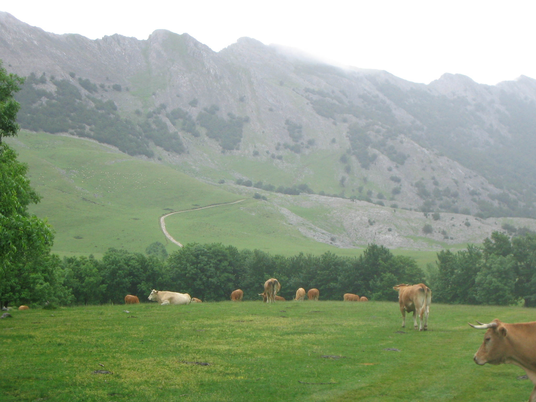 Macizo de Aztkorri desde Urbia